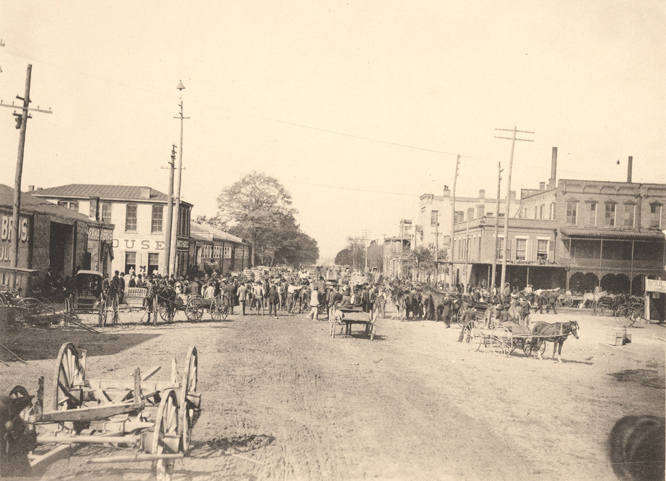 "Scene on Lee Street."